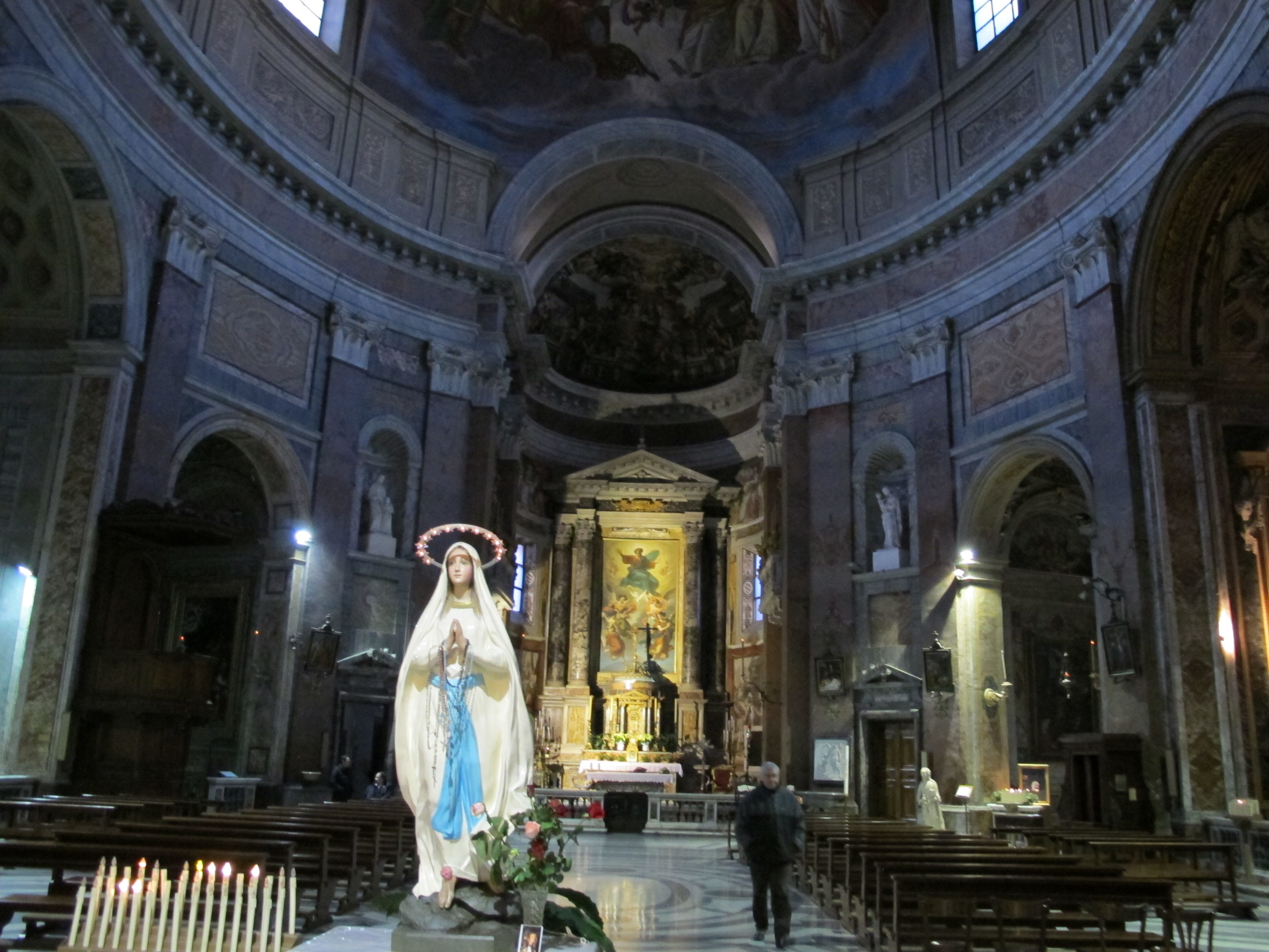 San giacomo in augusta, interno